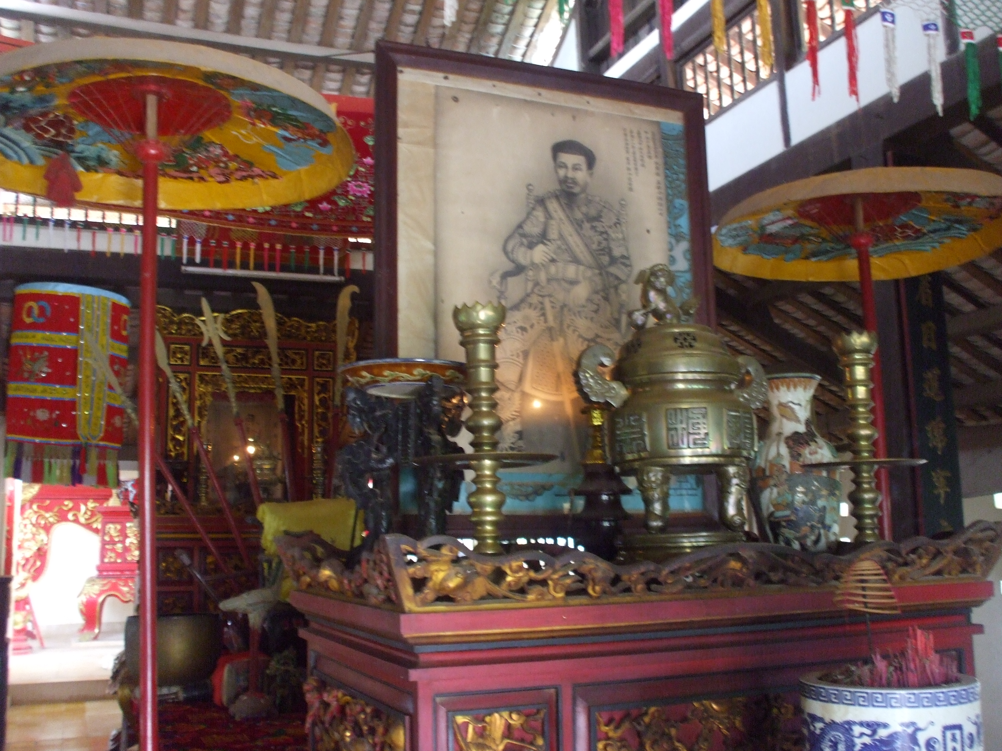 Bàn thờ Nguyễn Huỳnh Đức trong đền thờ ông ở Long An, Việt Nam.